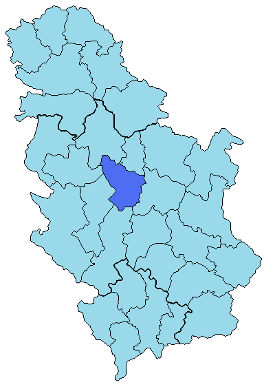 Положение Шумадийского округа на карте Сербии